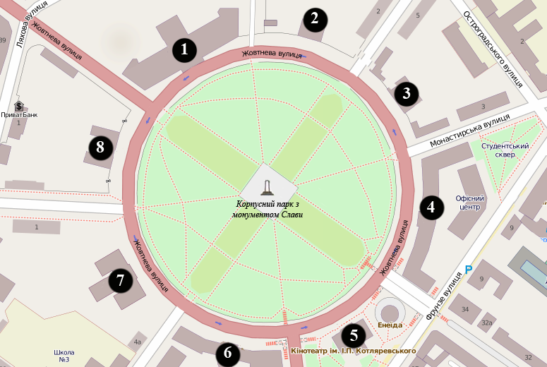 Кругла_площа_(Полтава).png: Кругла площа на схемі Полтави